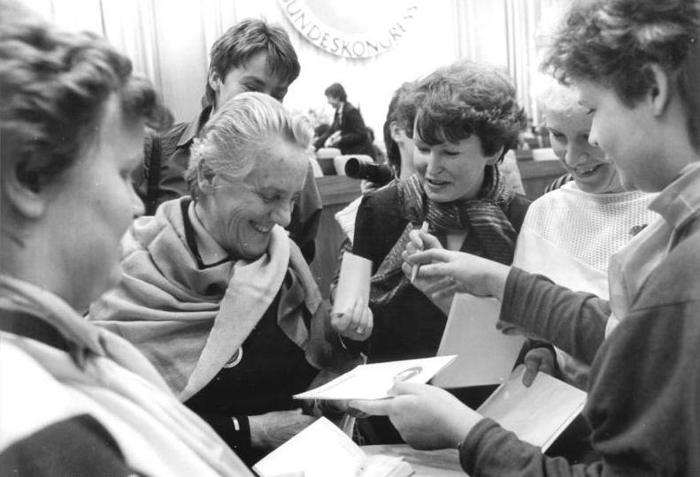 ADN-ZB Grimm-6.3.87-kb- Berlin: XII. DFD-Kongreß- Vielgefragte Gesprächspartnerin aus dem Bundeskongreß im Palast der Republik war IDFF-Präsidentin Freda Brown (2.v.l.).